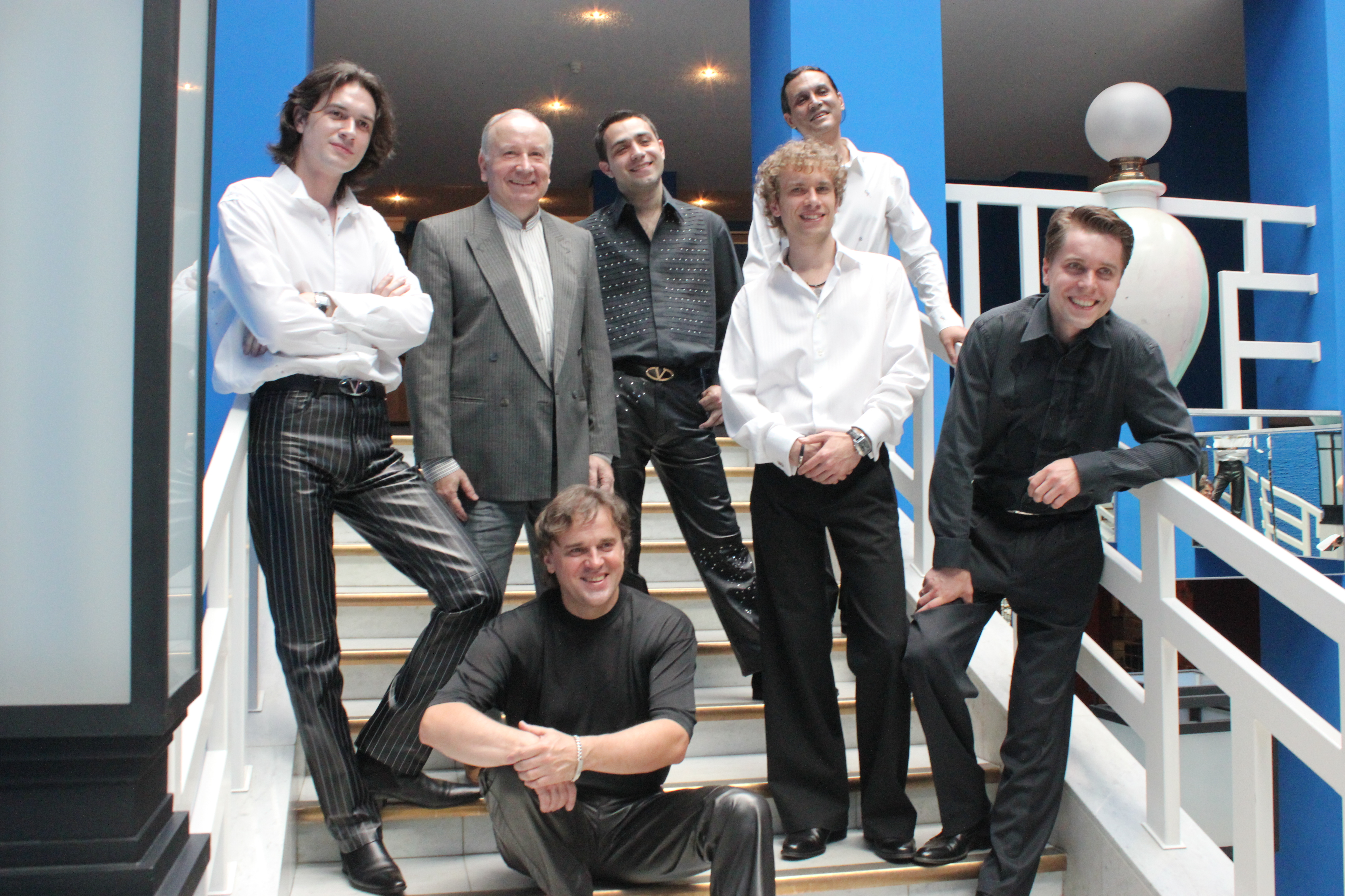 Эта фотография Павла Яковлевича Слободкина и коллектива «Весёлые ребята» . Павел Яковлевич Слободкин является основателем и бессменным руководителем ВИА «Весёлые ребята».